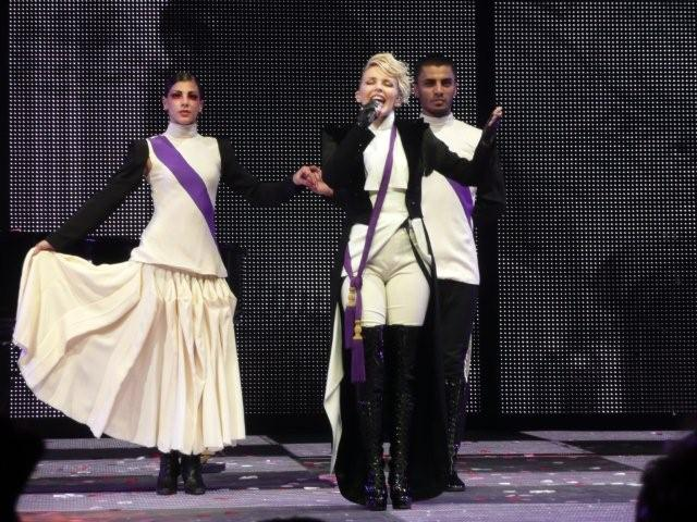 KylieX2008